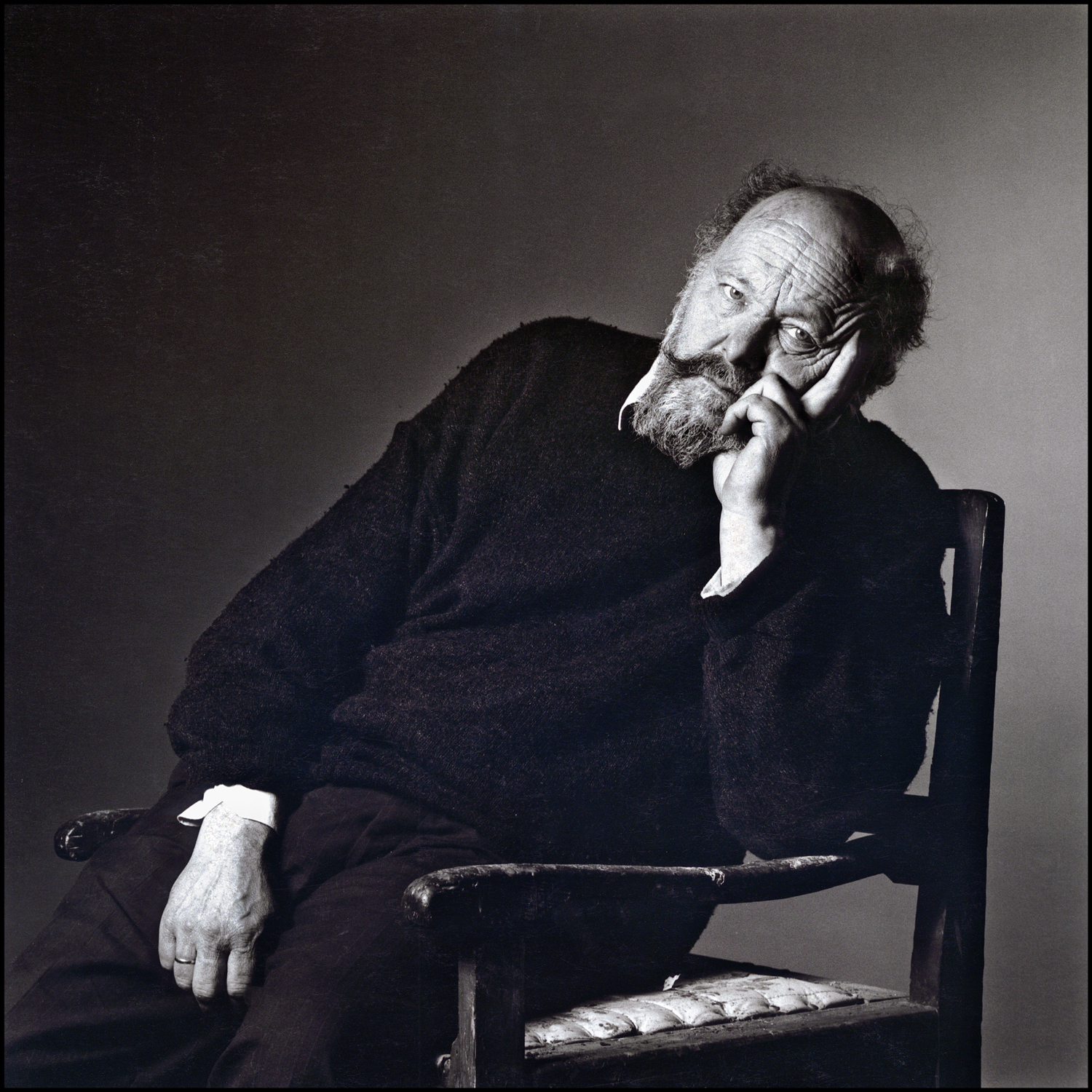 Portrait Josef Zenzmaier